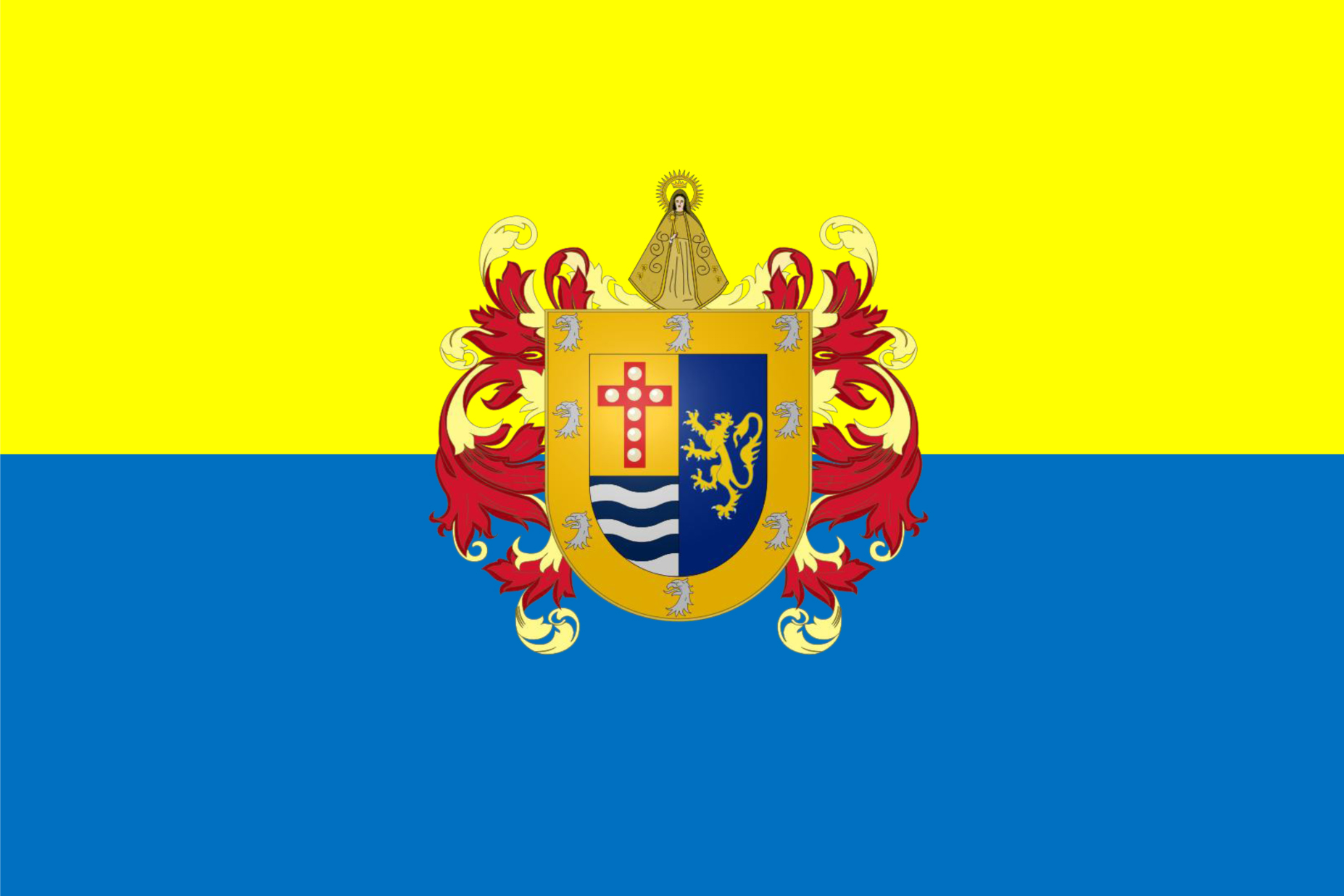 Modelo hecho según original conservado en España